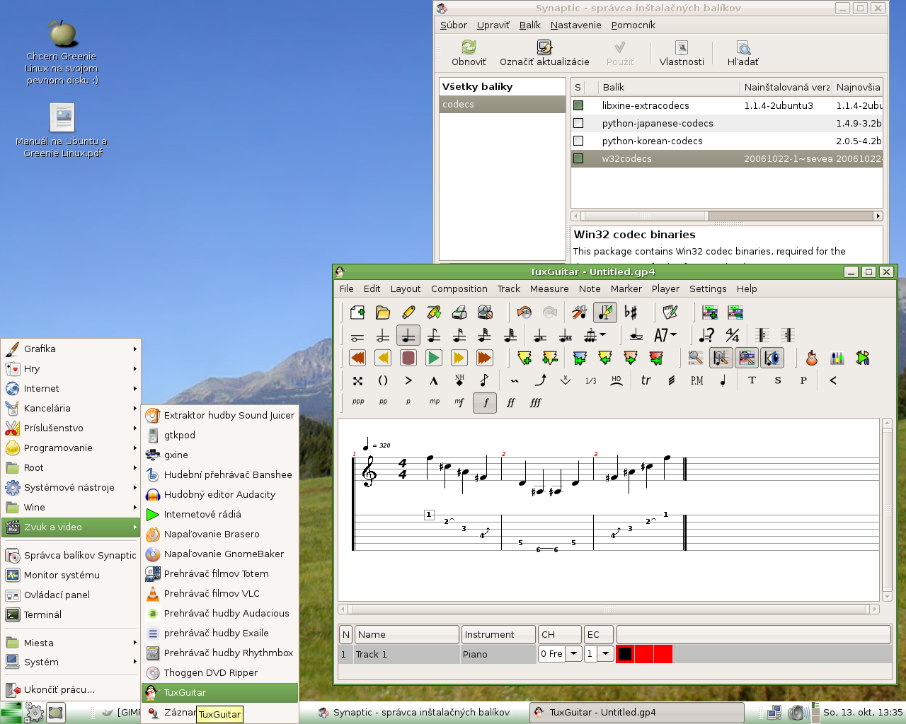 Greenie Linux screenshot v1.1a